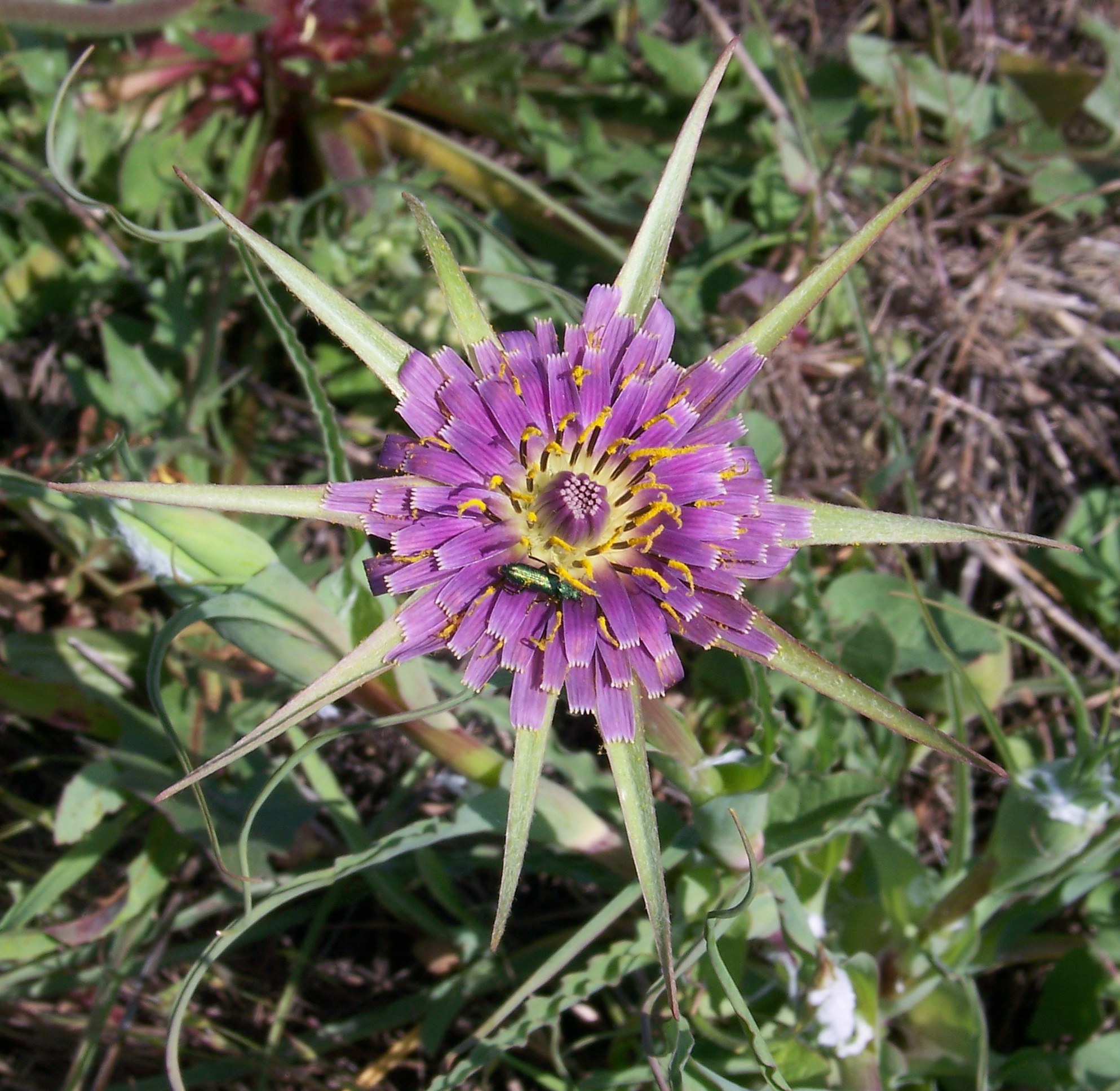 Tragopogon porrifolius (Barba de Cabra) : Capítulo en floración - Estanques del Arroyo de Rejas (Madrid).